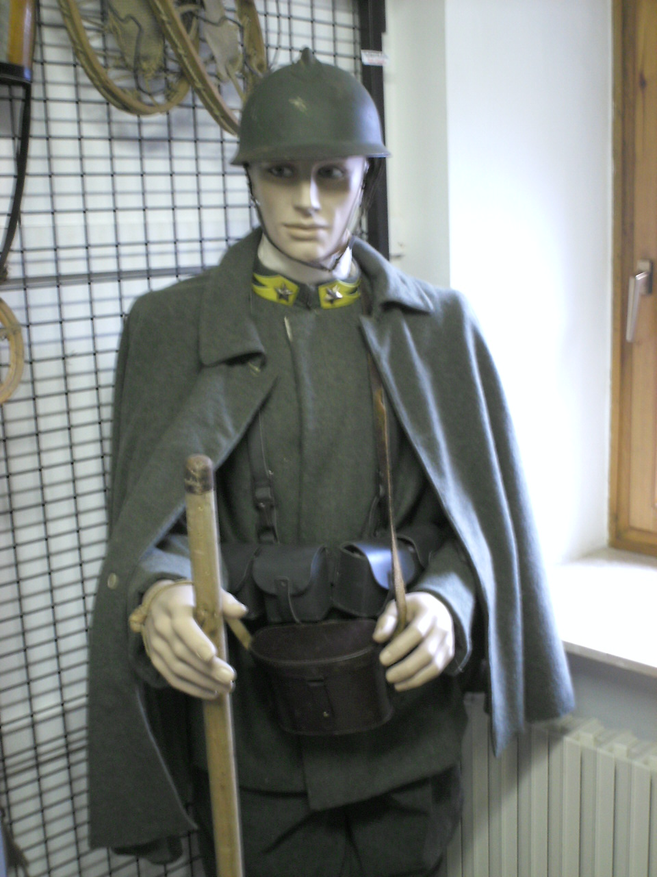 Figurine eines italienischen Infanteristen (Guardia di Finanza Alpina) in der Ausrüstung des ersten Weltkriegs (Dauerausstellung im ehemaligen italienischen Zollhaus am Plöckenpass).